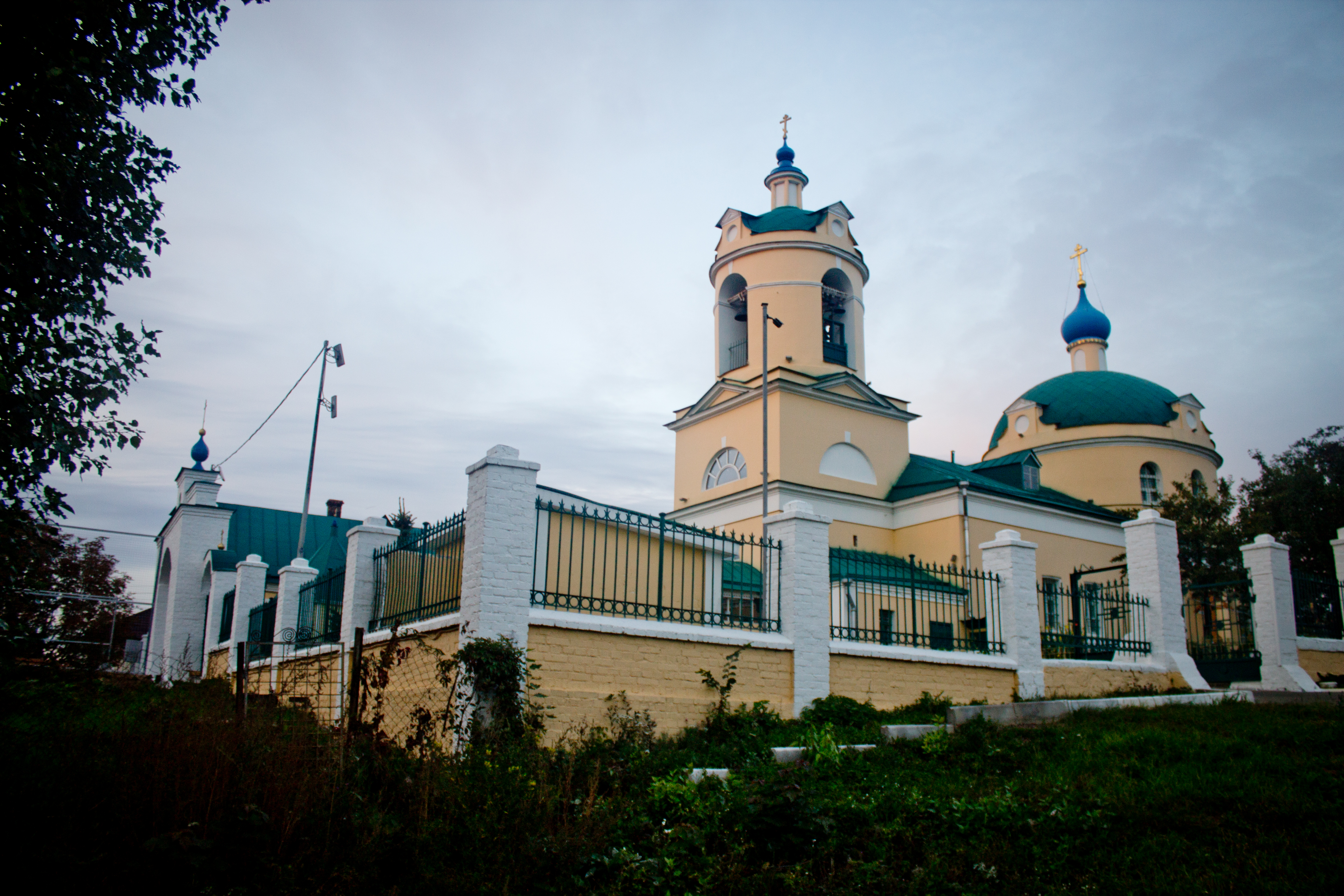 Ансамбль церкви Николая Чудотворца в Ермолино, Ленинский район, Московская область.